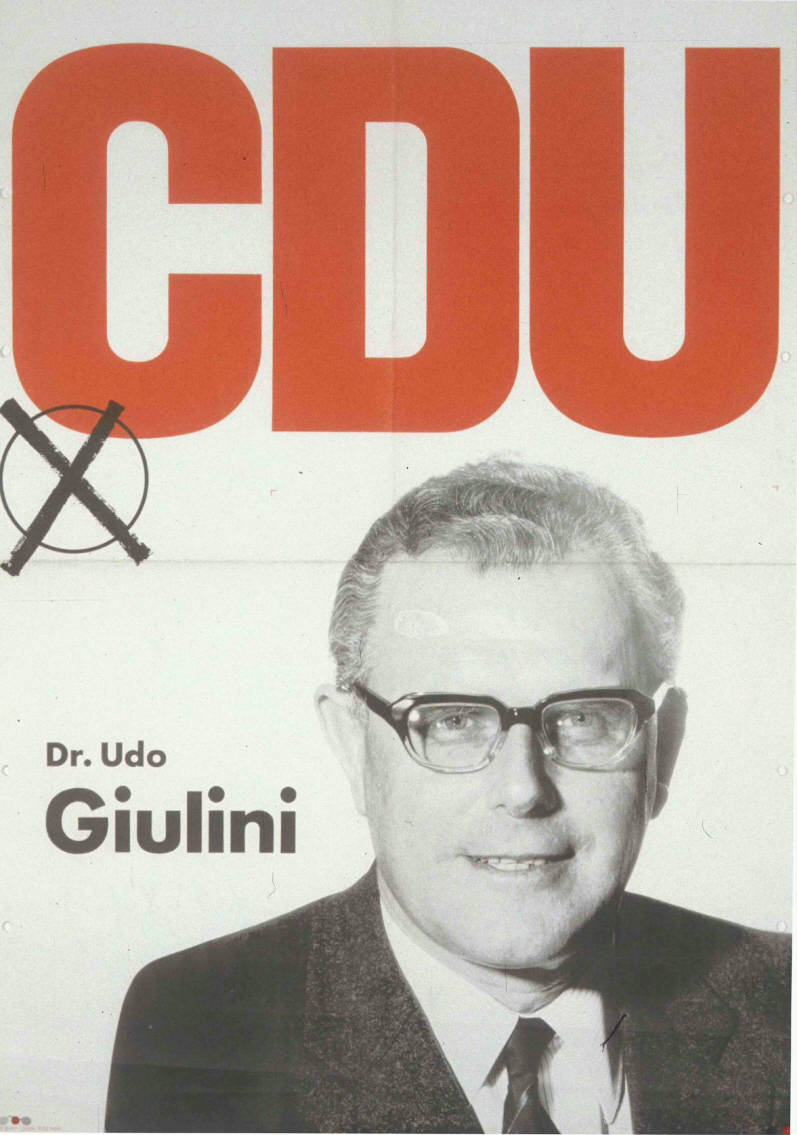 CDU Dr. Udo GiuliniAbbildung:Porträtfoto - StimmkreuzPlakatart:Kandidaten-/Personenplakat mit PorträtAuftraggeber:CDU BonnDrucker_Druckart_Druckort:KVD KölnObjekt-Signatur:10-001: 1381Bestand:Plakate zu Bundestagswahlen (10-001)GliederungBestand10-18:Plakate zu Bundestagswahlen (10-001) » Die 6. Bundestagswahl am 28. September 1969 » CDU » Mit PorträtfotoLizenz:KAS/ACDP 10-001: 1381 CC-BY-SA 3.0 DE